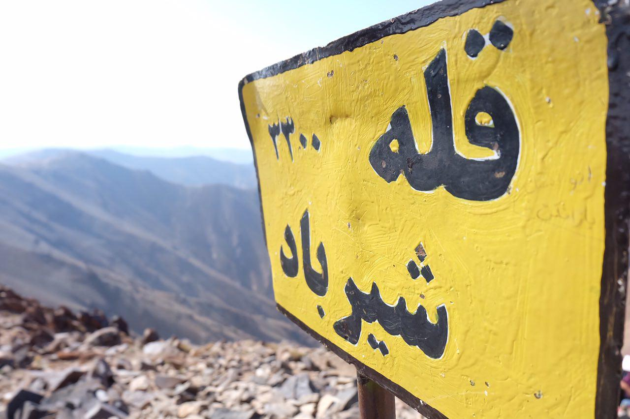 تابلو نصب شده بر روی قله شیرباد